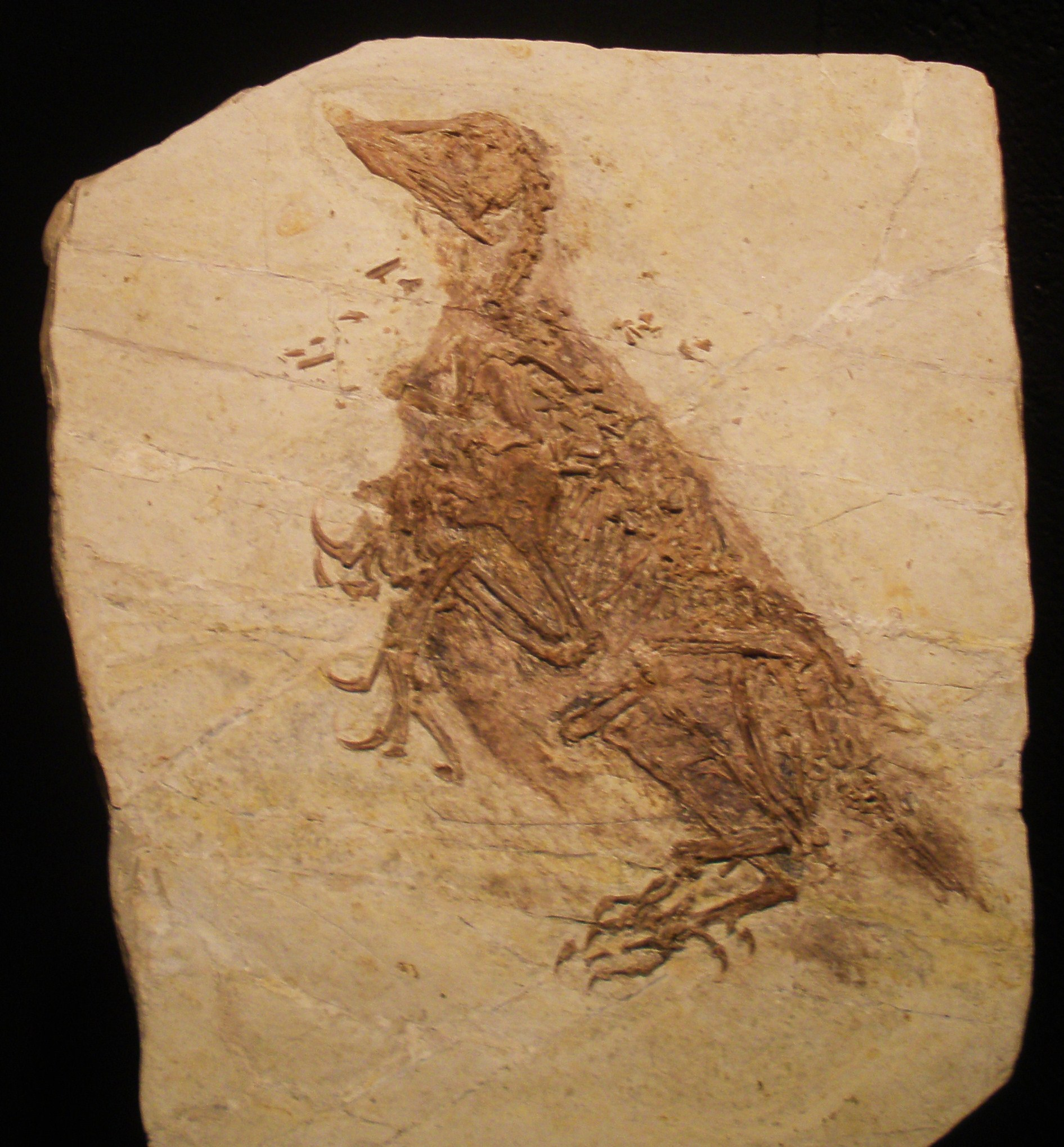 fossil Confuciusornis